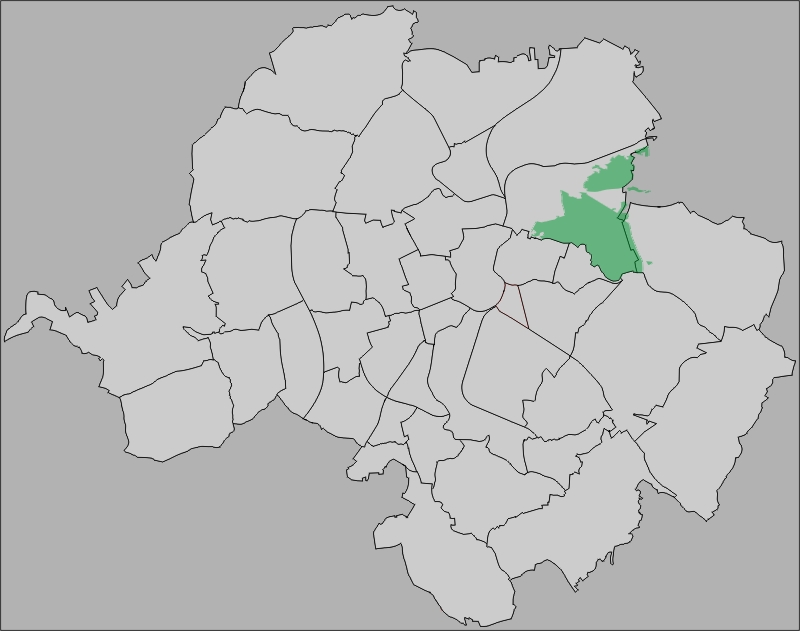 Von Benutzer:MilhouseDaniel selbsterstellte Grafik über die Lage des Zeisigwald in den Flurgrenzen der Stadt Chemnitz (Stand: 2006).